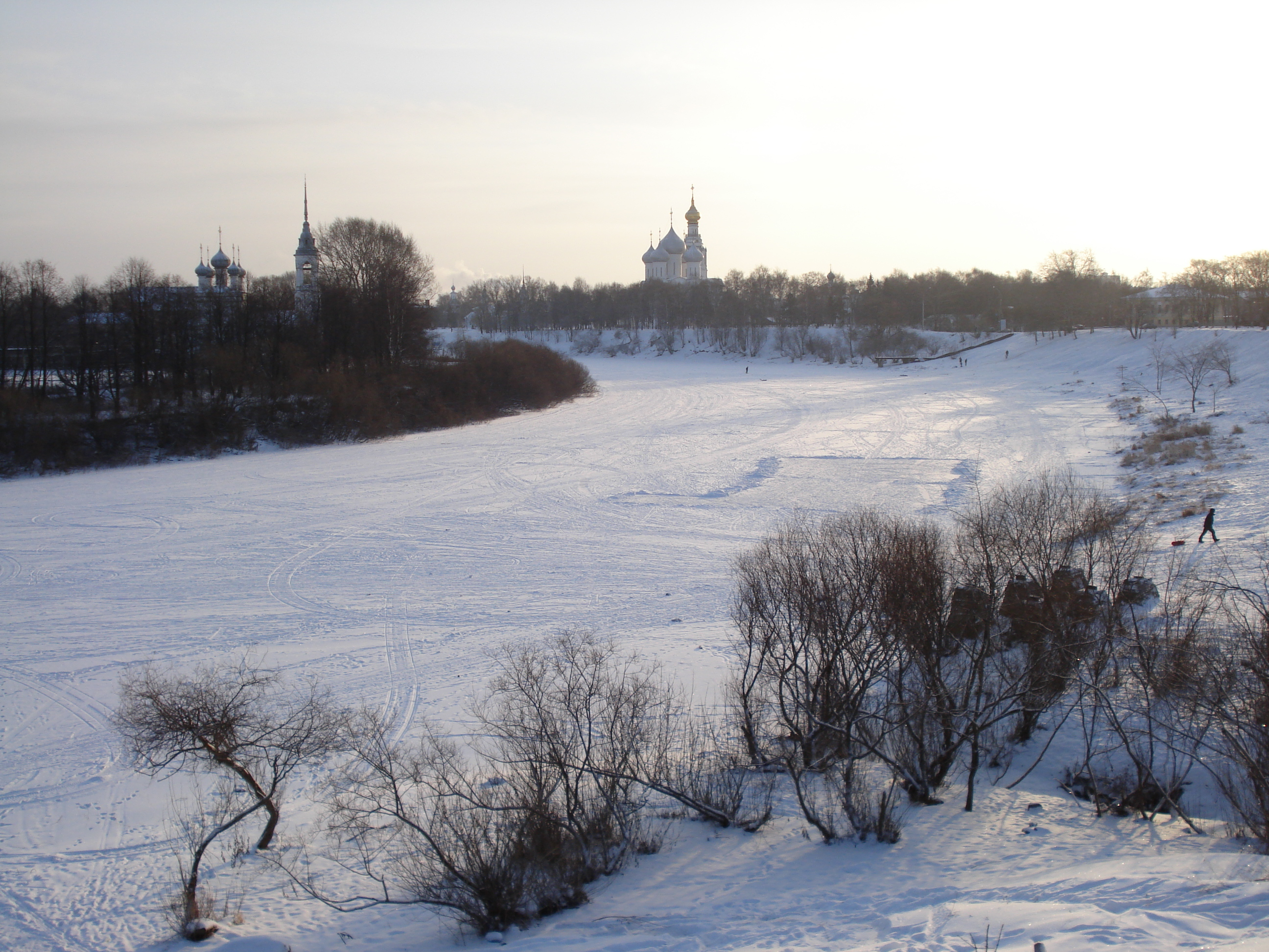 Река Вологда в Вологде